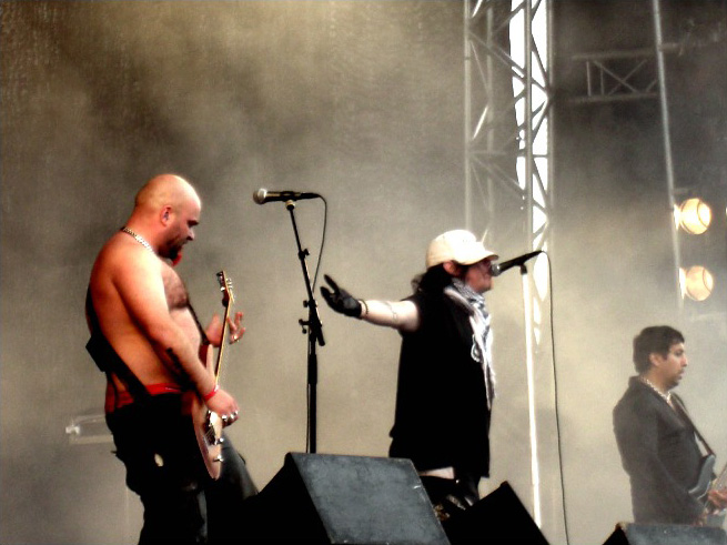 Lillasyster på Metaltown 28 juni 2008